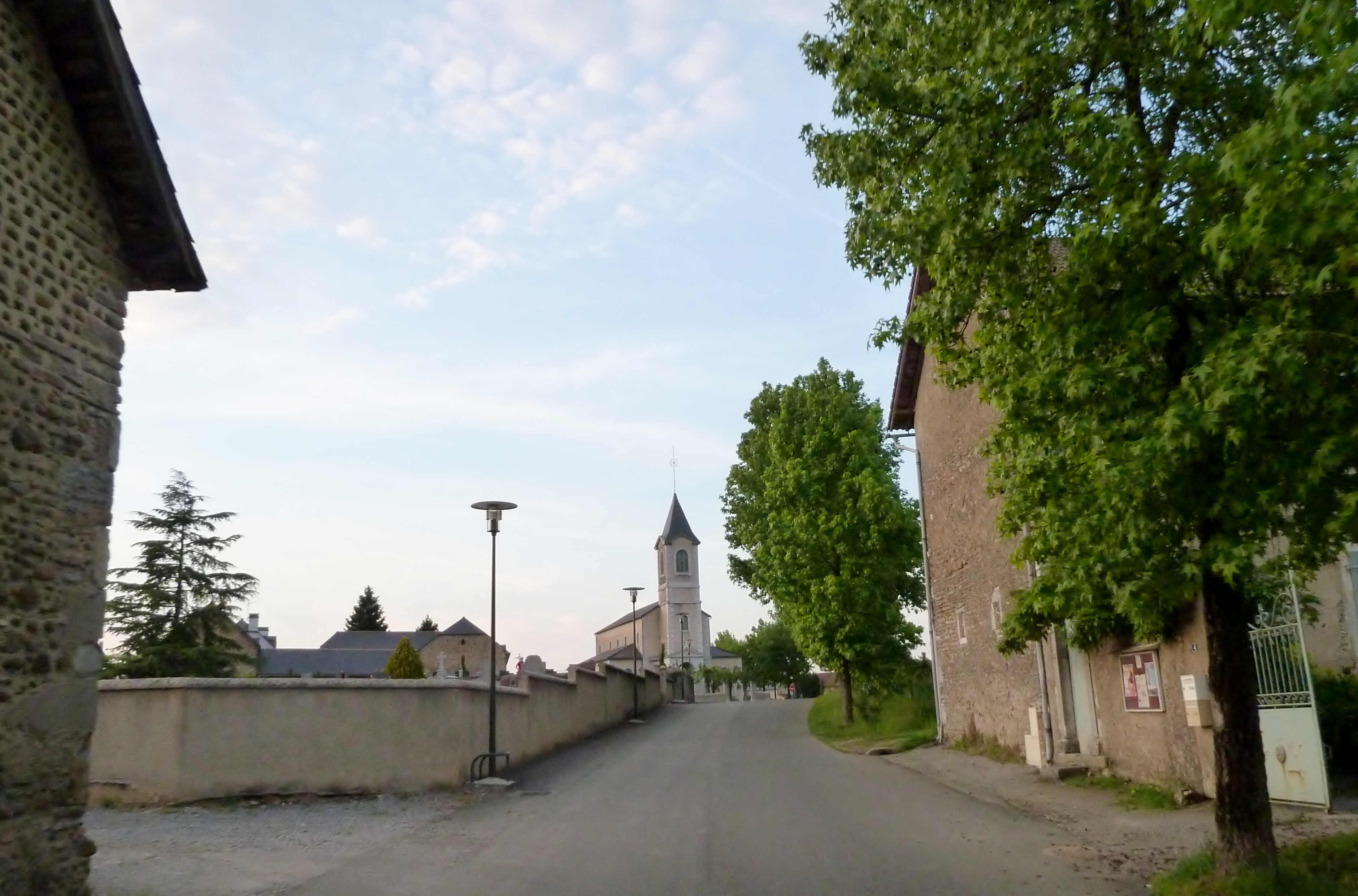 Sendets (Pyrénées-Atlantiques)